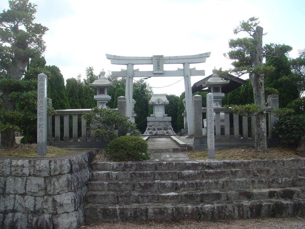 香川県綾歌郡綾川町、高山航空神社